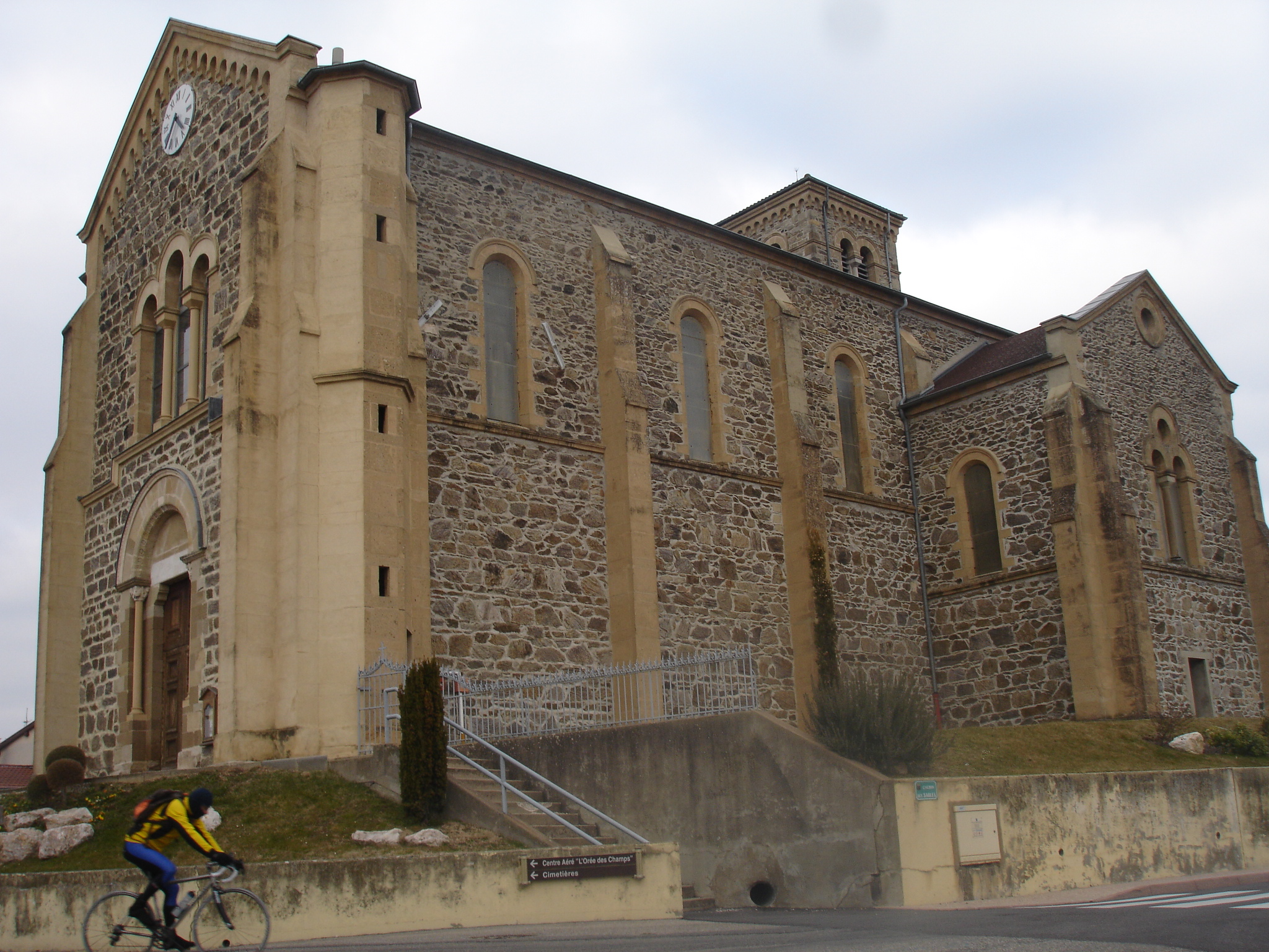 Chaponnay (69) : l'église